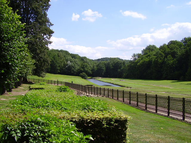 Le site de l’abbaye de Port-Royal-des-Champs